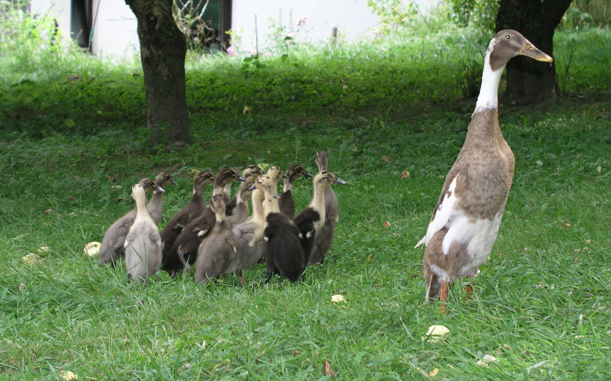 Laufenten, eine Brut, 2 Woche alt (Anas platyrhynchos f. domestica)